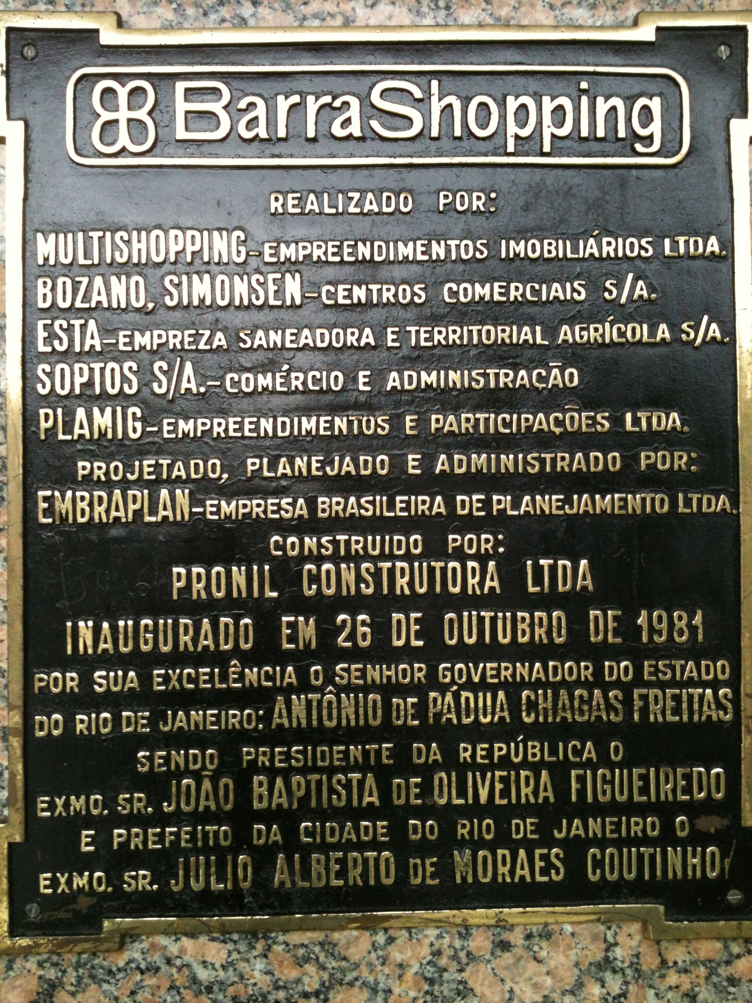 Placa de Inauguração do Barra Shopping - Rio de Janeiro - RJ